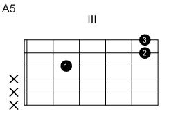 Eigenanfertigung